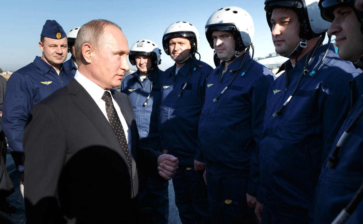 Во время посещения Президентом России Владимиром Путиным авиабазы Хмеймим в Сирии.